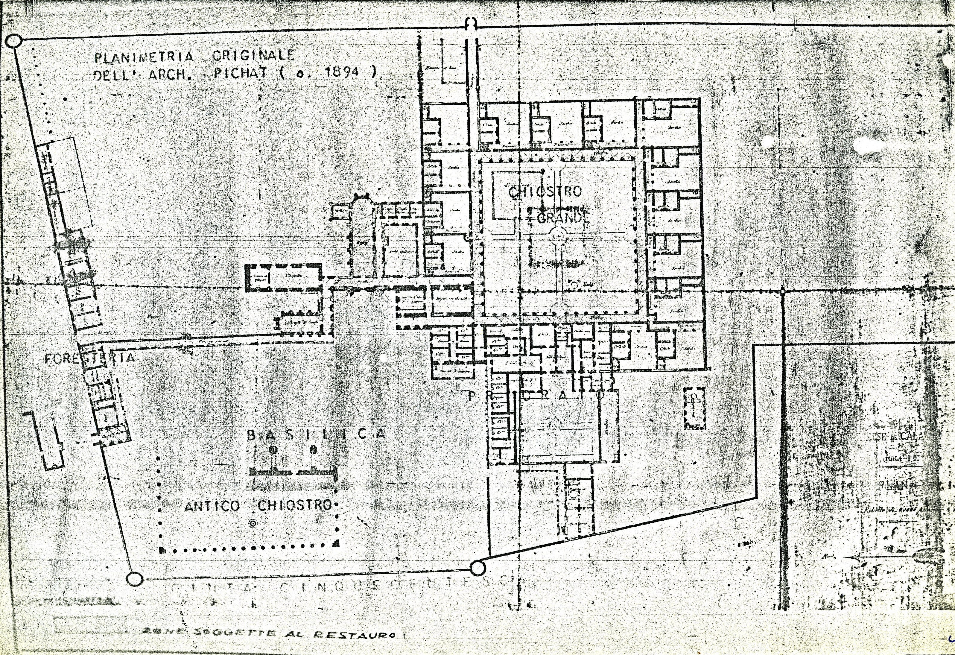 Planimetria generale della Certosa. L'immagine risulta dalla scansione di una riproduzione del progetto originale custodito nell'Archivio della Certosa. La scansione è stata eseguita da Alberto Fichera, utente registrato di Wikipedia.